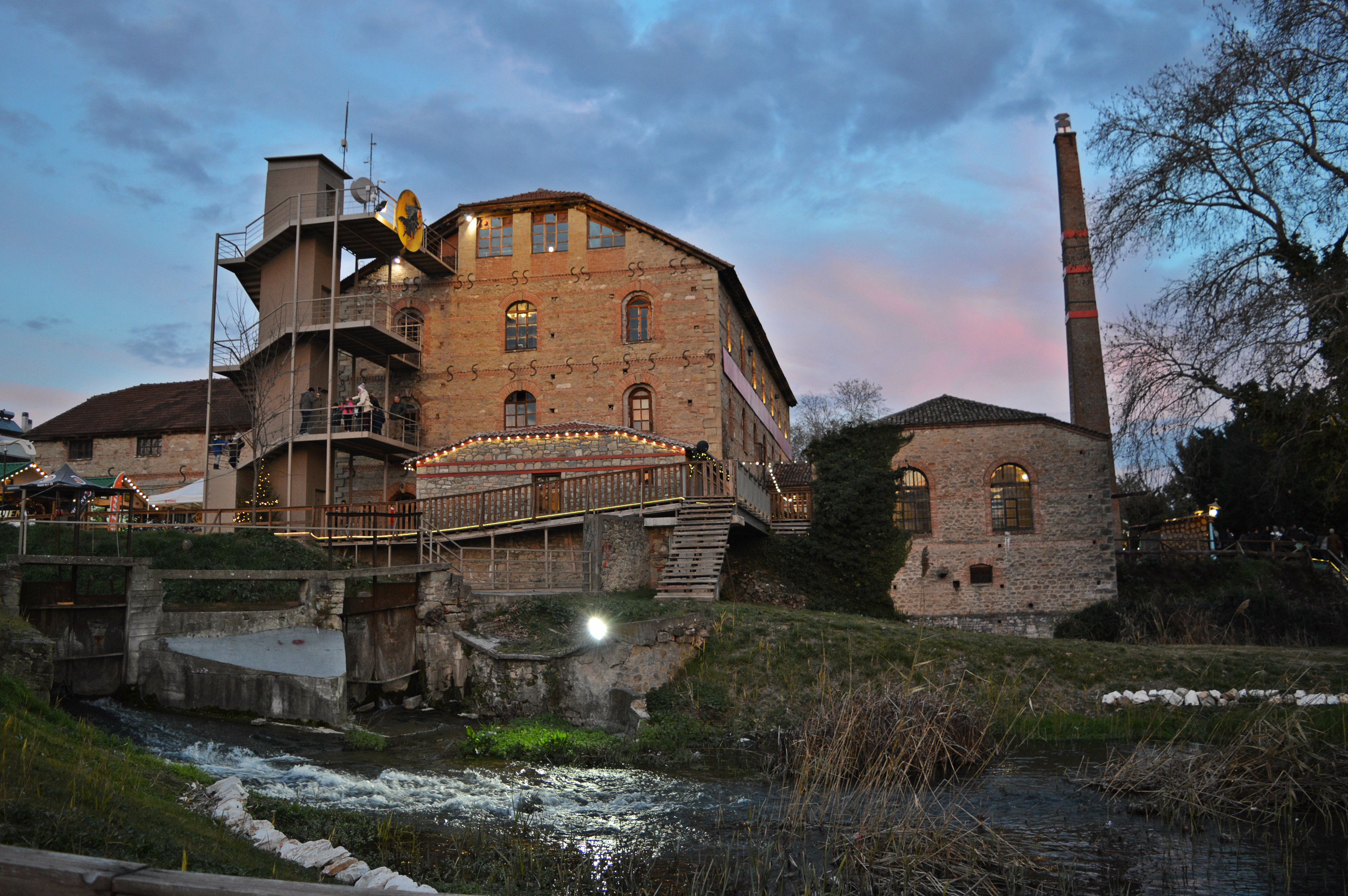 Μύλος Ματσόπουλου«Μύλος Ματσόπουλου»